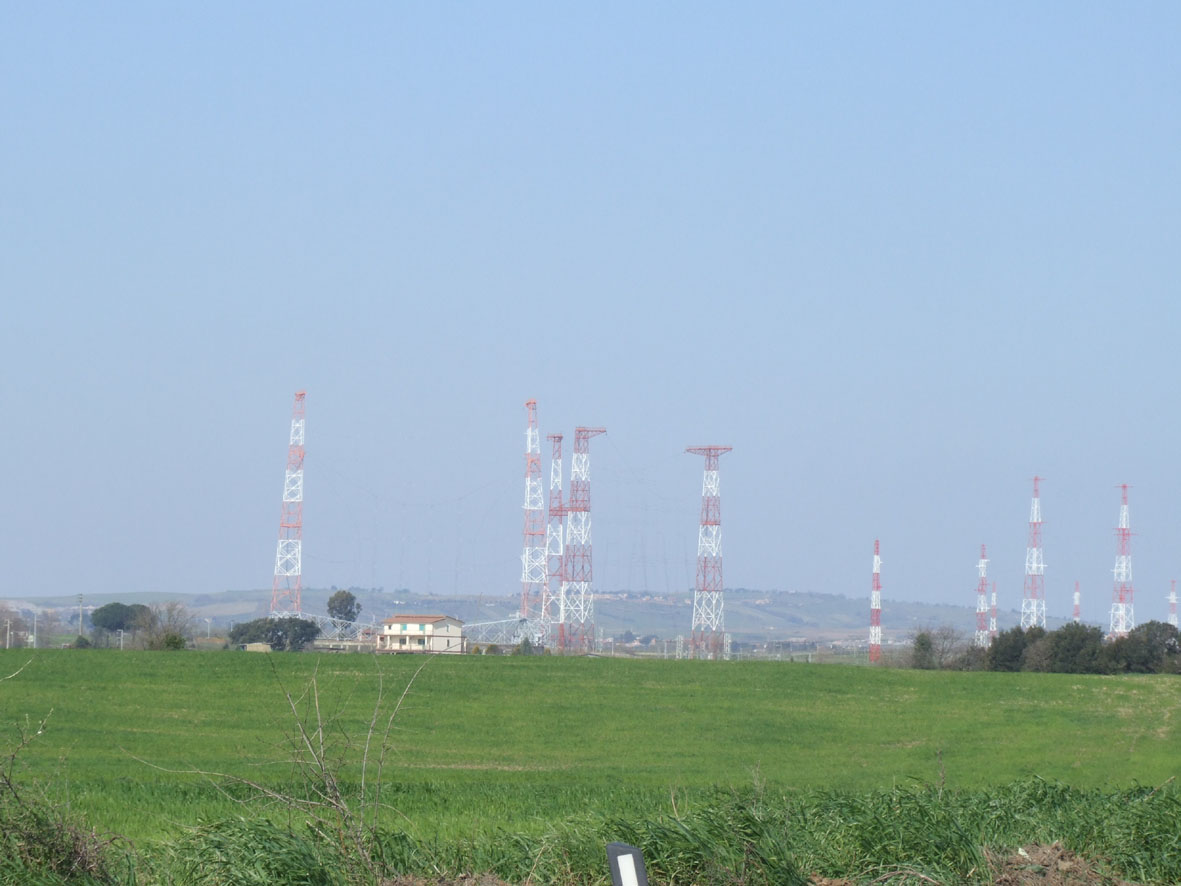 Santa Maria di Galeria, Roma, trasmettitori